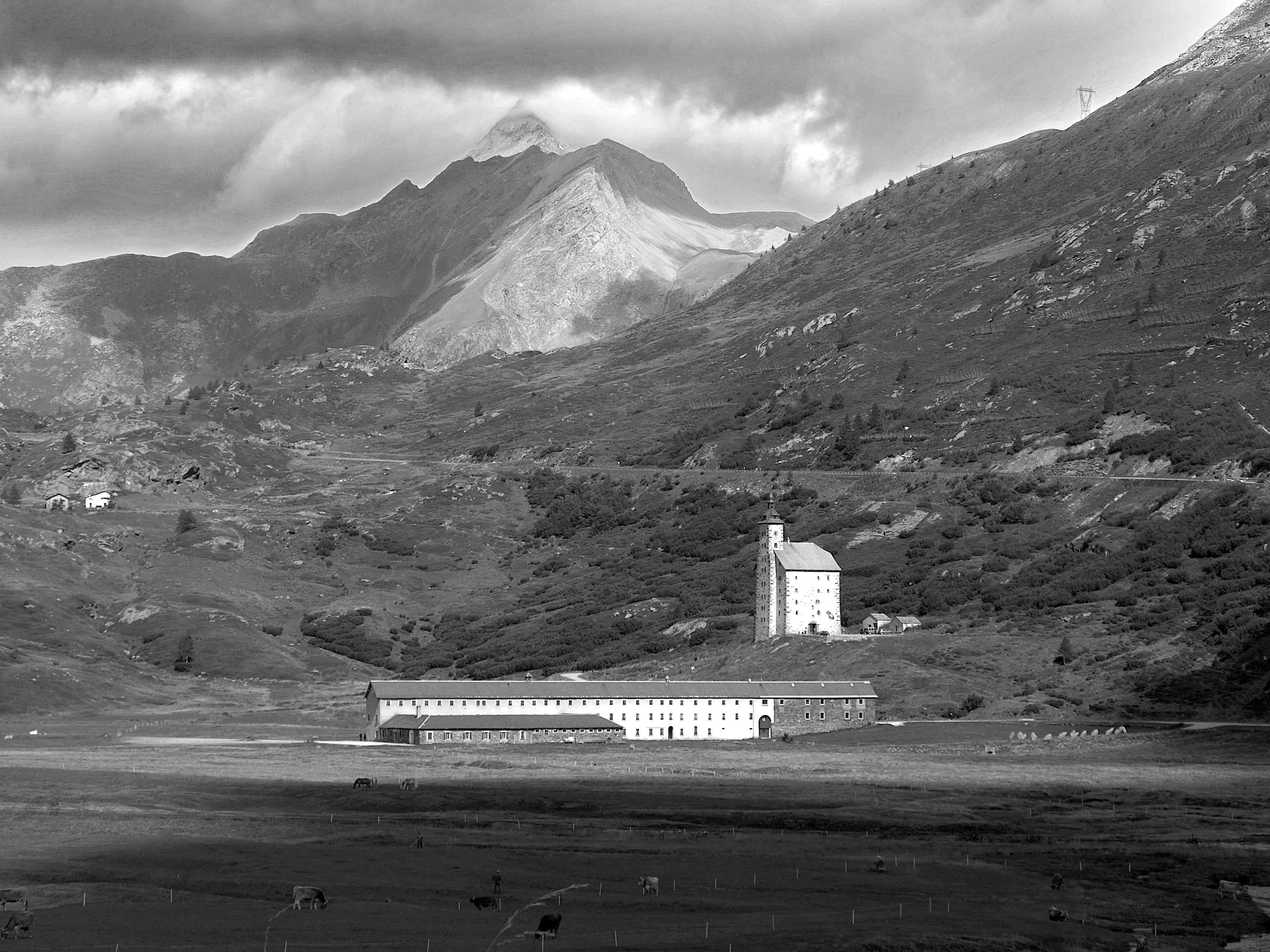 Altes Hospiz and Barralhaus auf dem Simplonpass (2010)